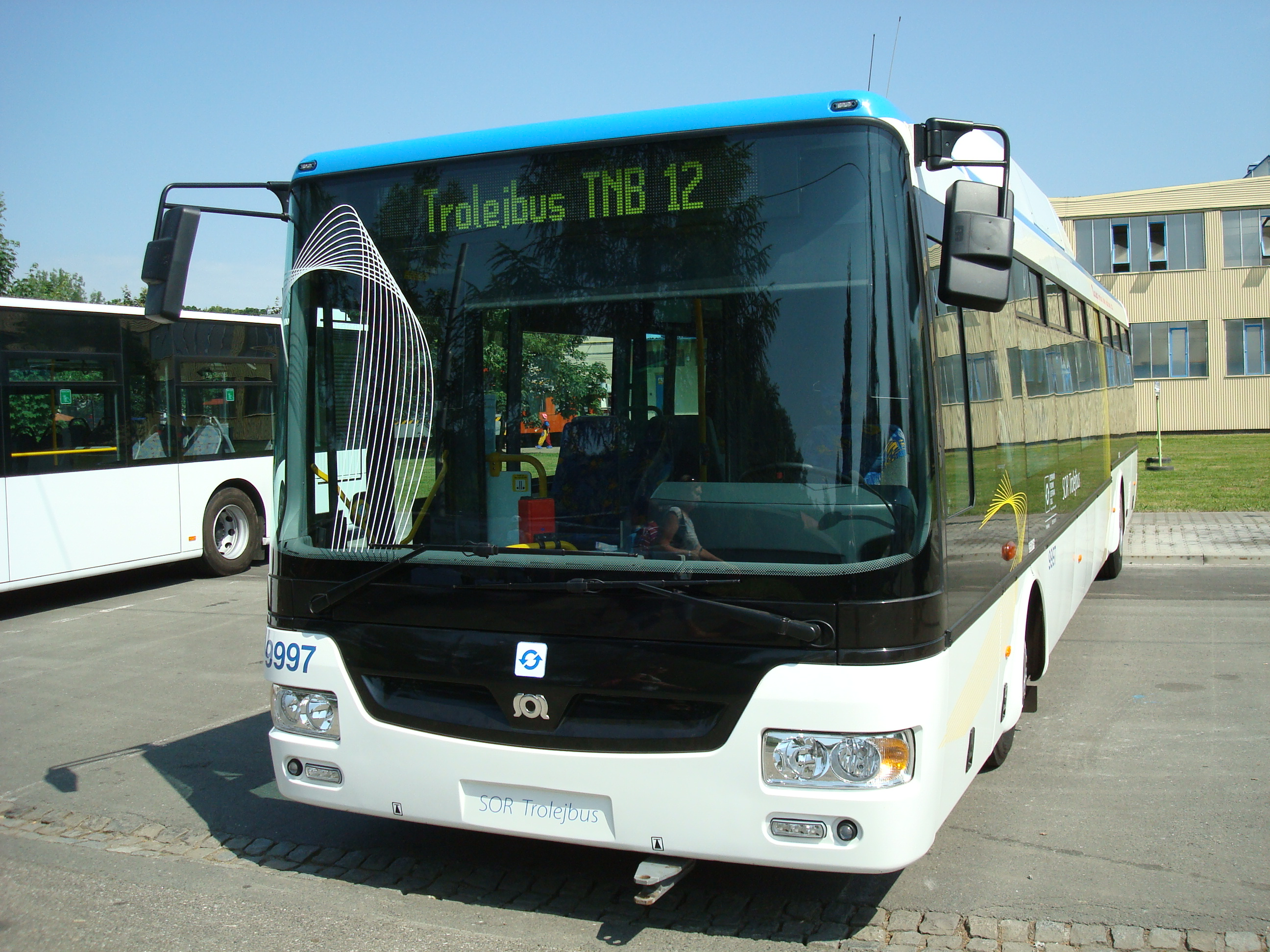 Ostrava